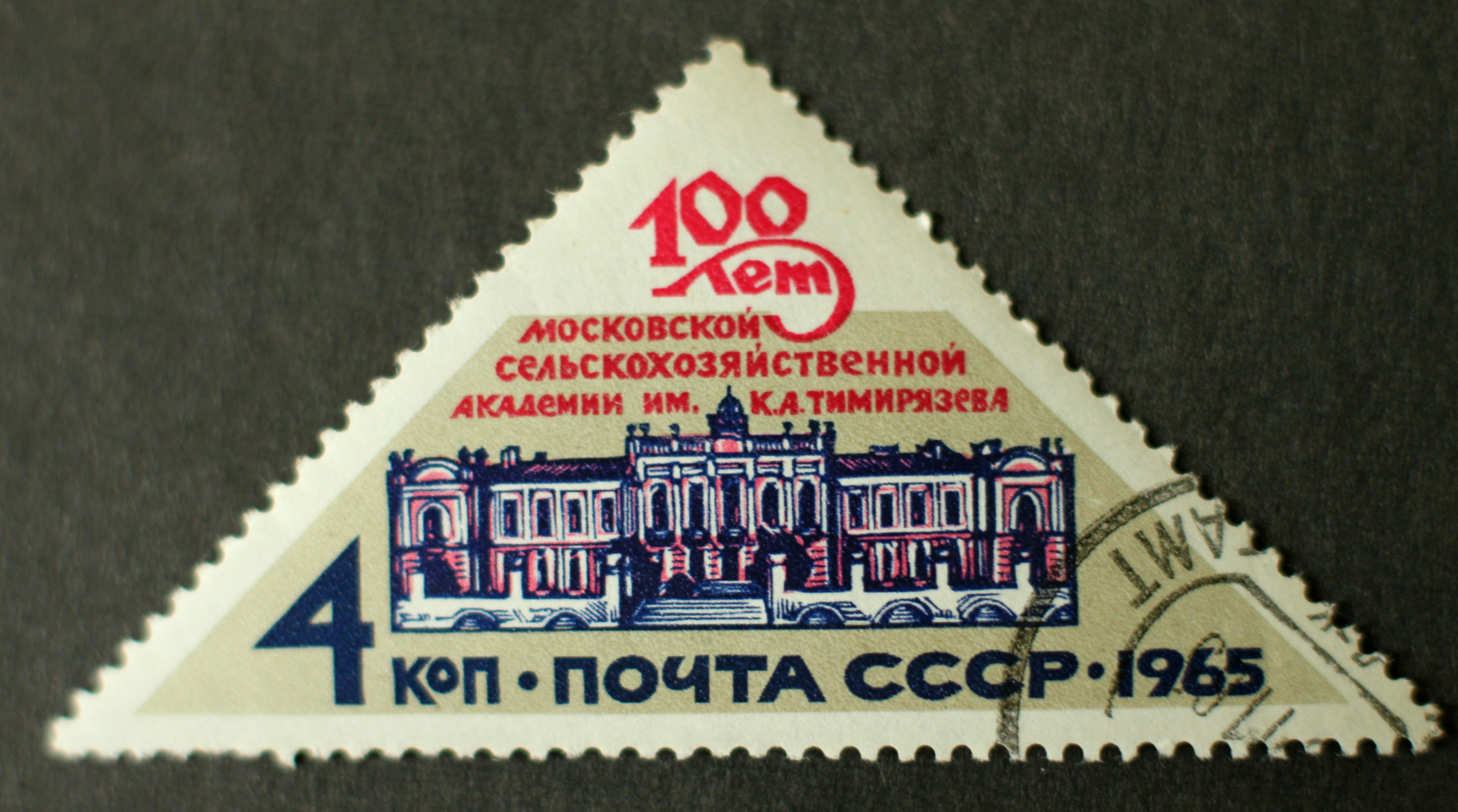 Briefmarke, Sowjetunion, 1965